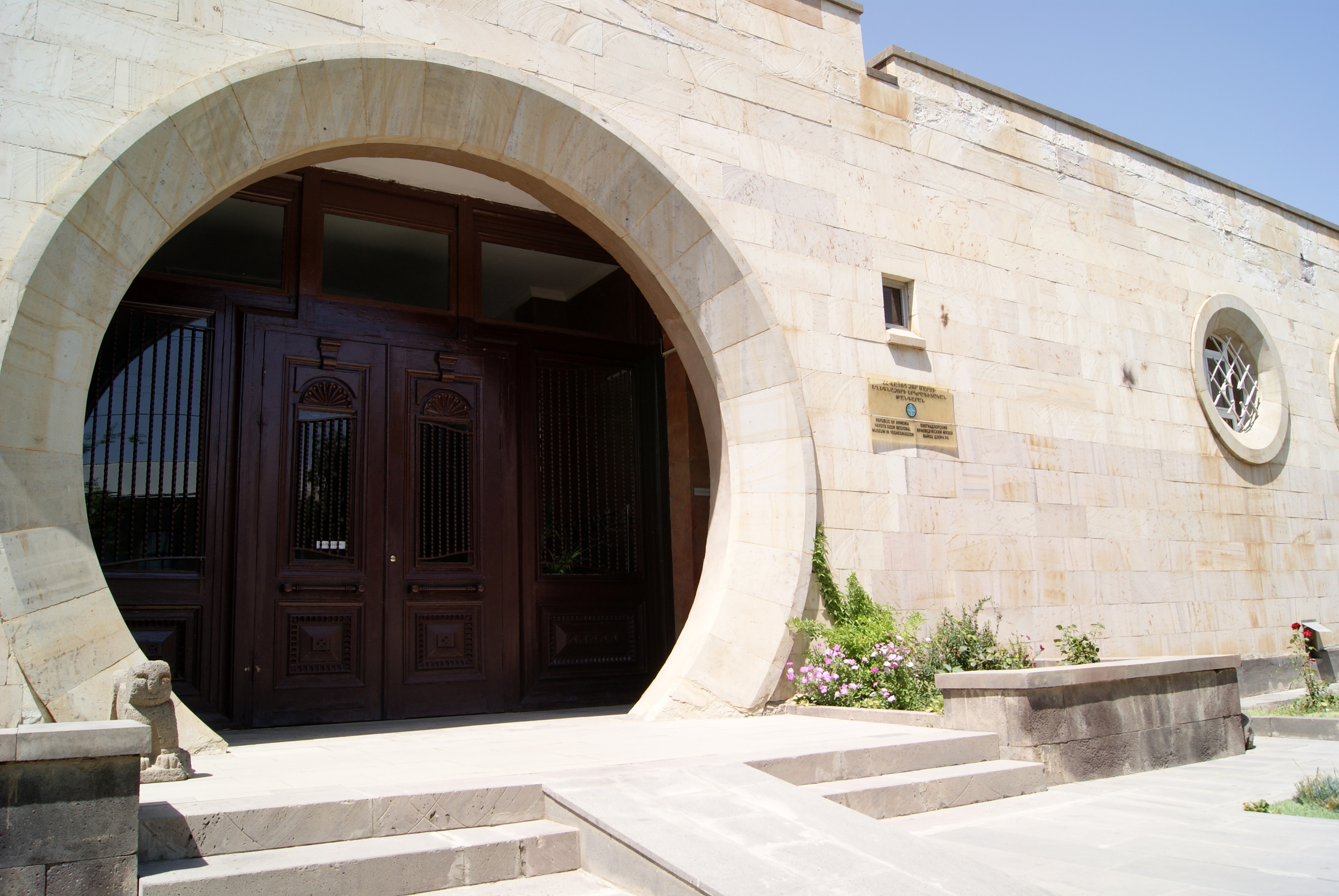 Թանգարանի շենք. Վայոց Ձորի երկրագիտական թանգարանը 1/8